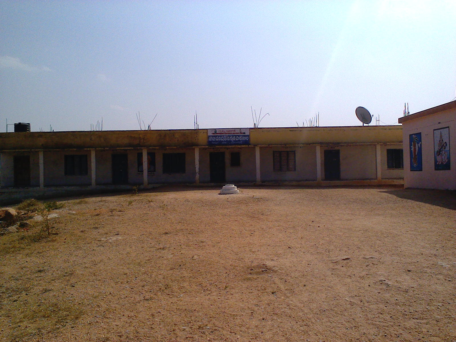 జిల్లా పరిషత్ ఉన్నత పాఠశాల, కొండాపురం